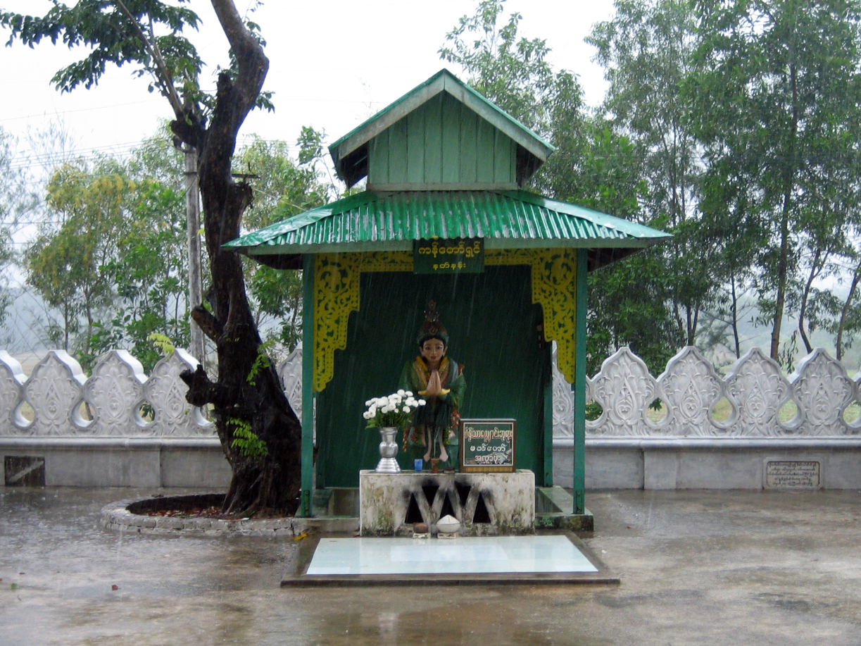 Seinthalyaung Nat Medaw shrine ("palace"), Bago, Myanmar